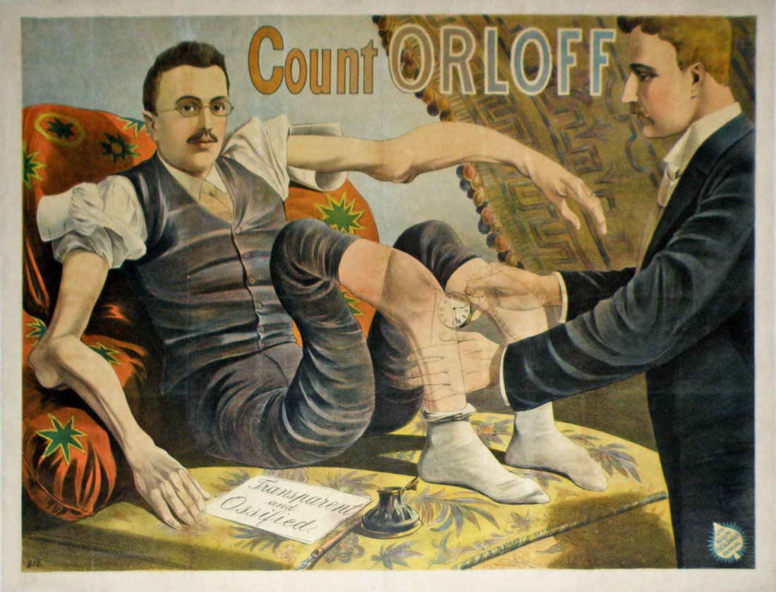 Ivannow Wladislaus von Dziarski-Orloff, Künstlername: Count Orloff, der durchsichtige Mann